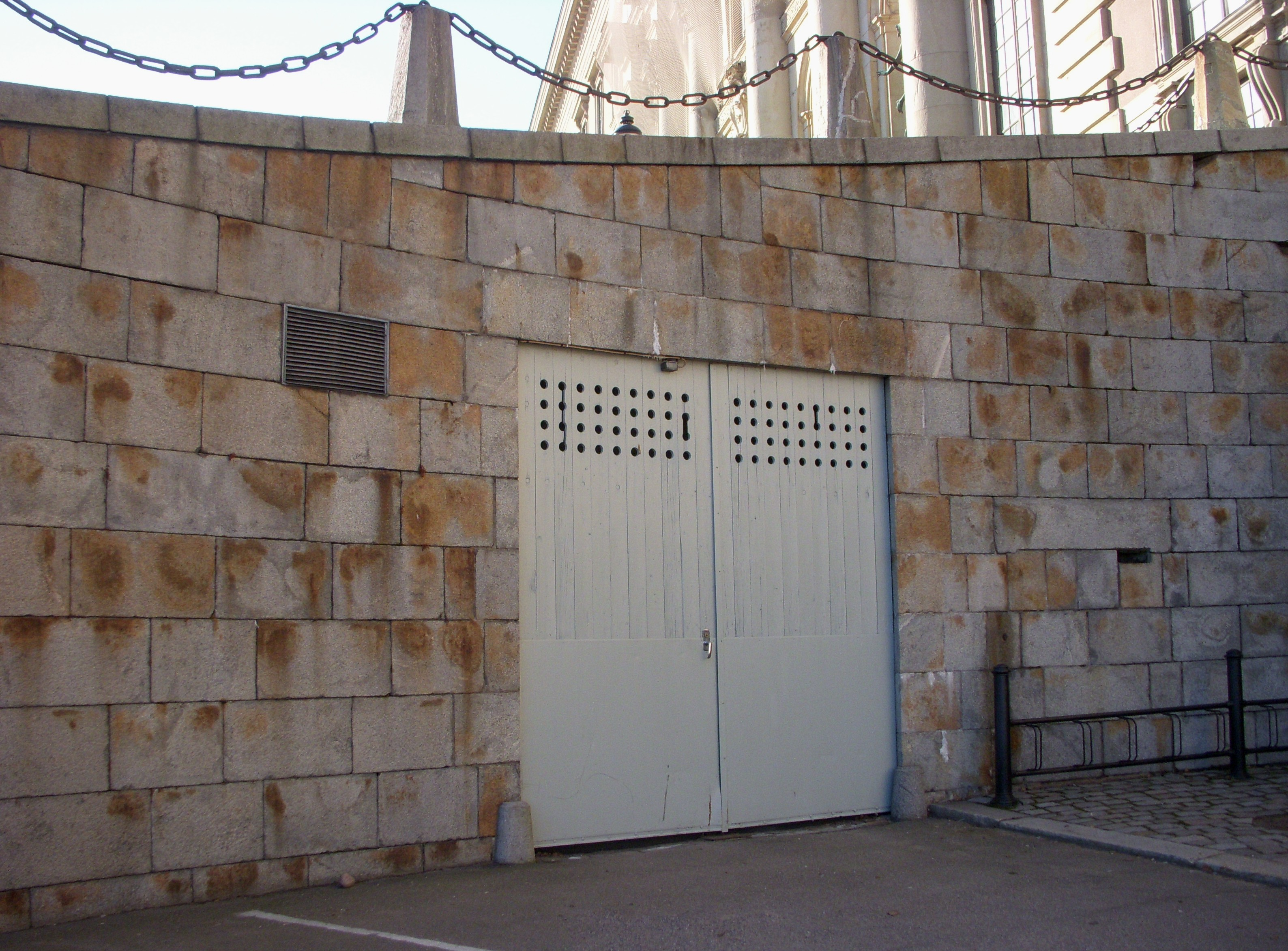 Inrymningsväg till Slottsbackens skyddsrum (utanför Livrustkammaren)